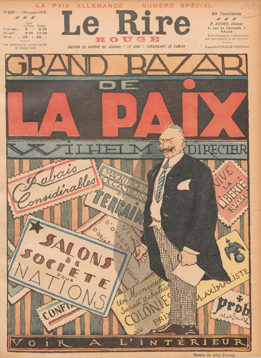 Grand Bazar de La Paix - Wilhelm Directeur - Voir à l'intérieur.